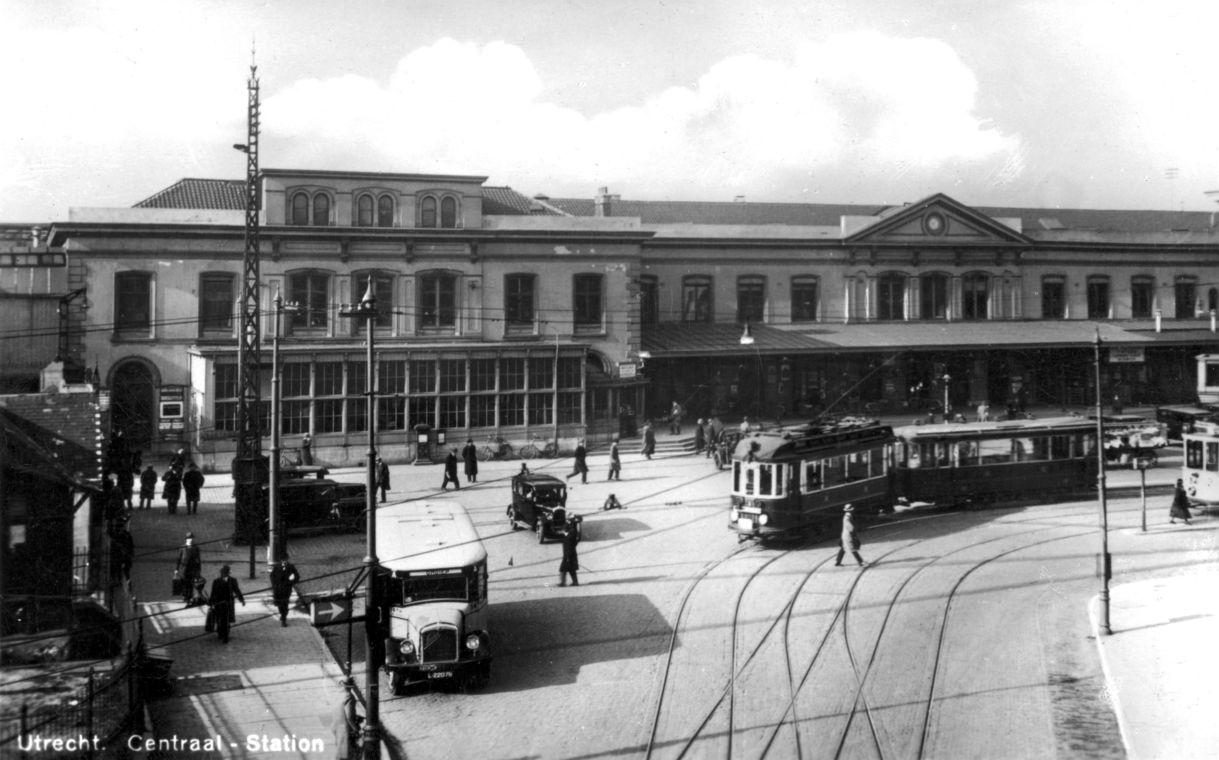 Tramstel van de NBM (Utrecht - Zeist) op het Stationsplein te Utrecht; circa 1935. Collectie van het Utrechts Archief.